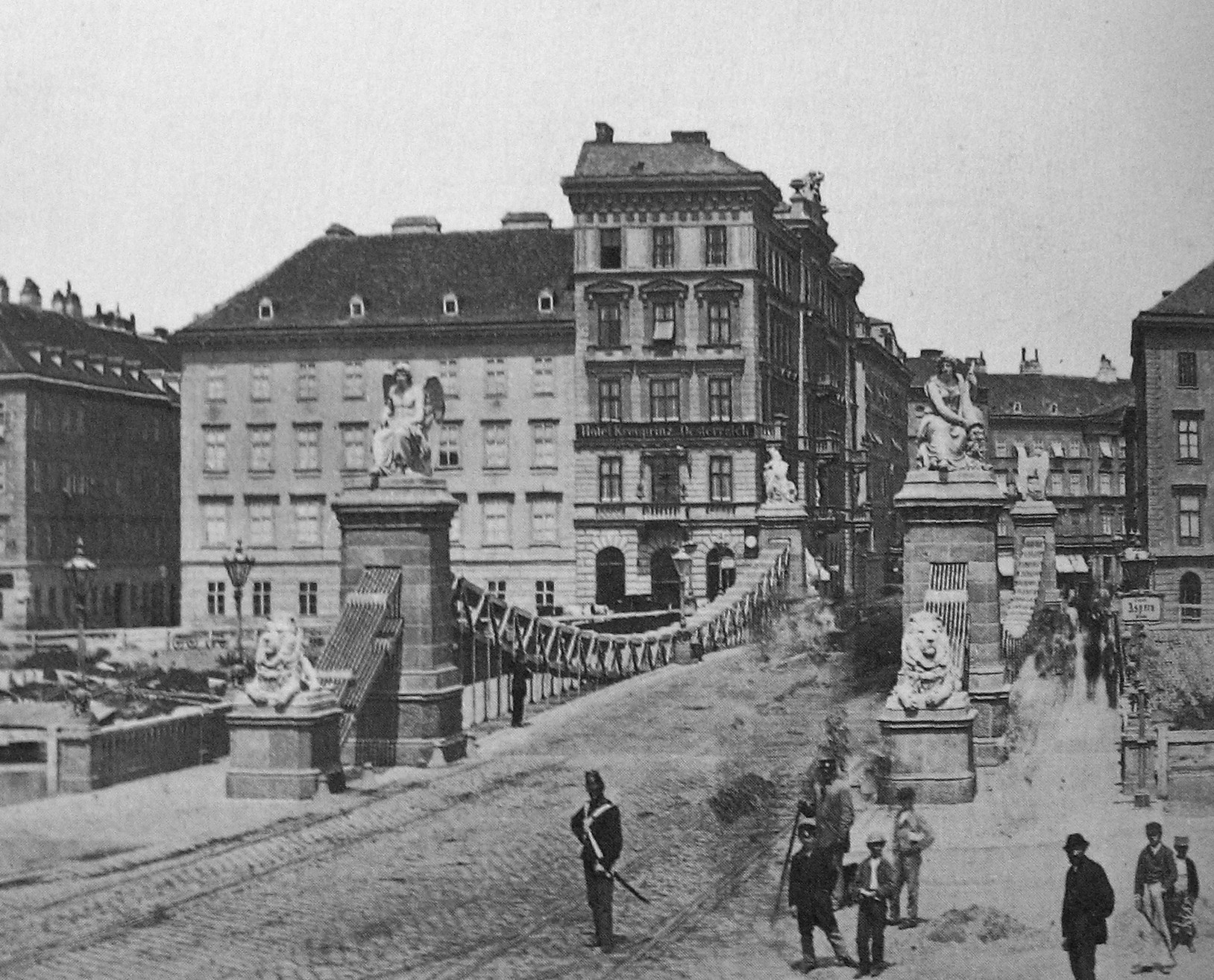 Wien, Aspernbrücke, 1875,Blick über die Fahrbahn der Brücke zum linken Ufer des Donaukanals, zu den Häusern der Unteren Donaustrasse und in die Asperngasse (heute Aspernbrückengasse). Links der Asperngasse an einem Balkon Tafel mit Aufschrift Hotel Kronprinz Österreich, ganz links Fischergasse (vor 1864 Obere Fischergasse).